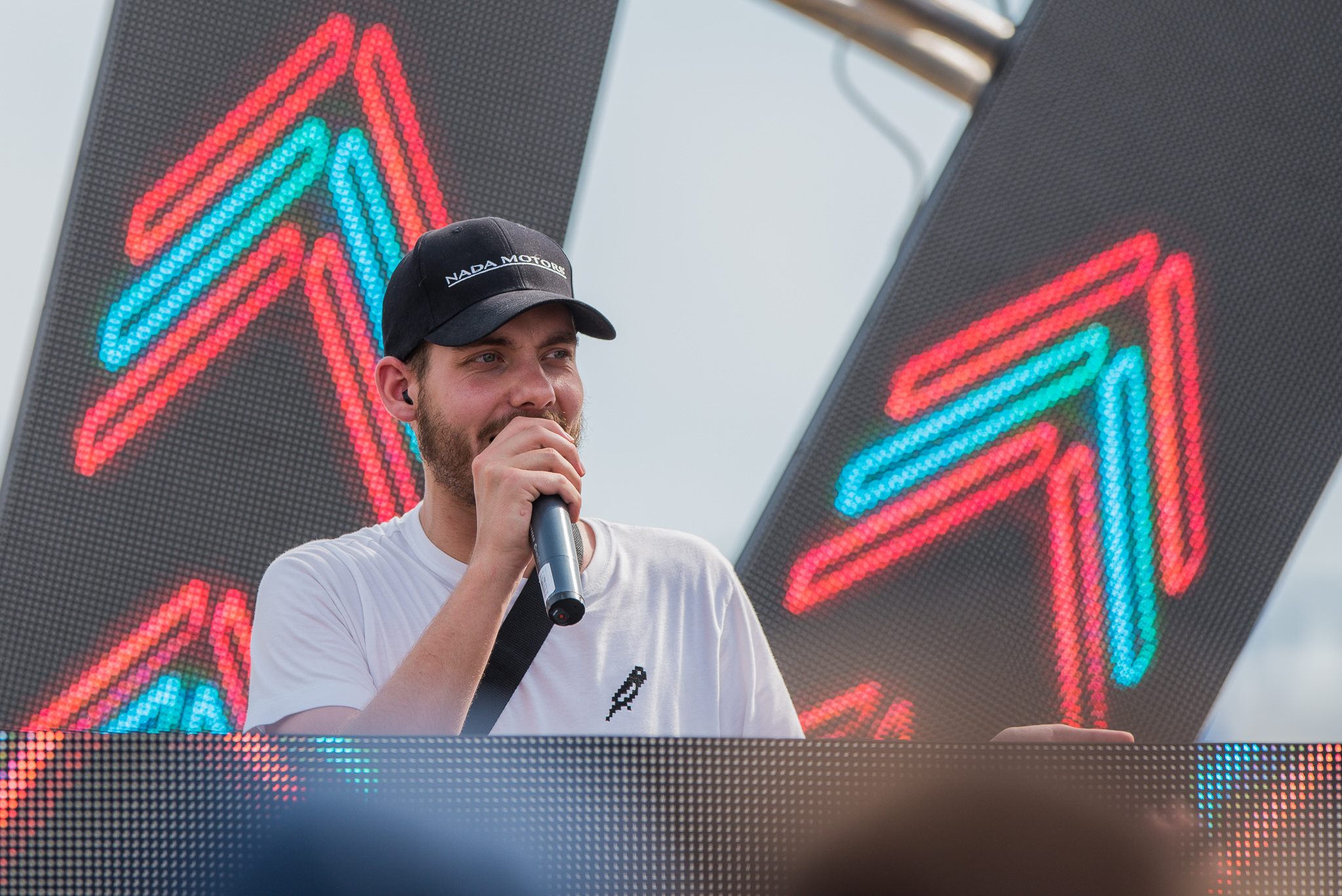 3rd Stage,Festival,Konzert,Livekonzert,Livemusik,Musik,Open Beatz 2016,San Holo,Sander van Dijck